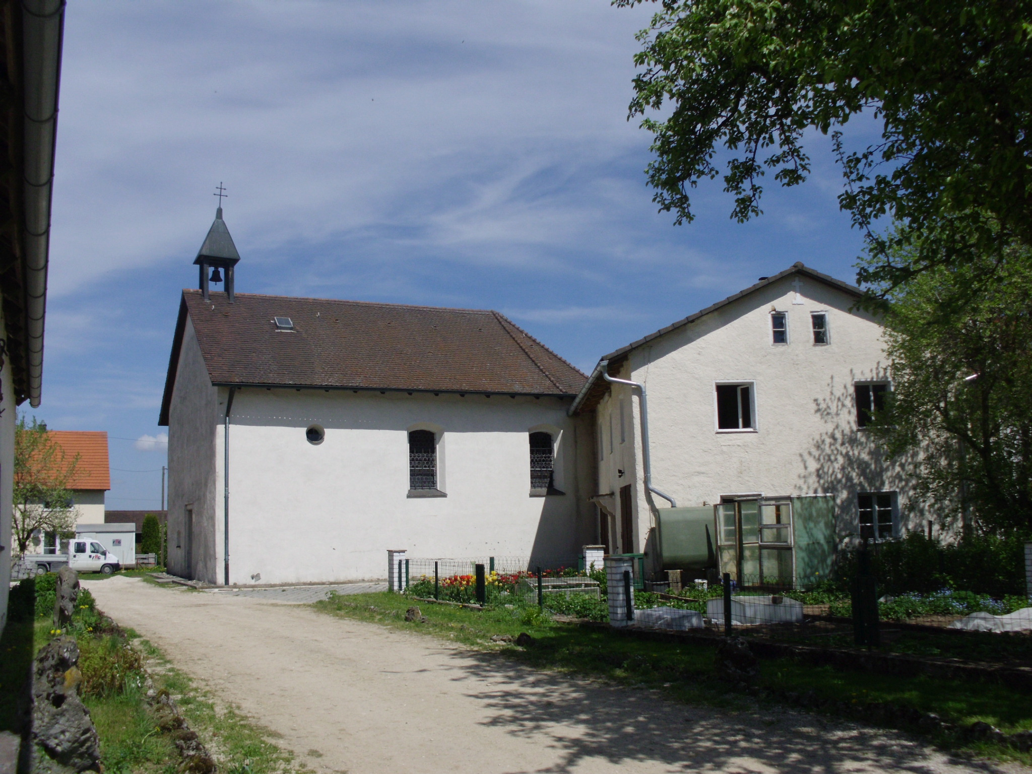 Der Weiler Sankt Egidi, Gemeindeteil von Raitenbuch im Landkreis Weißenburg-Gunzenhausen (Bayern), mit der Kapelle St. Ägidius